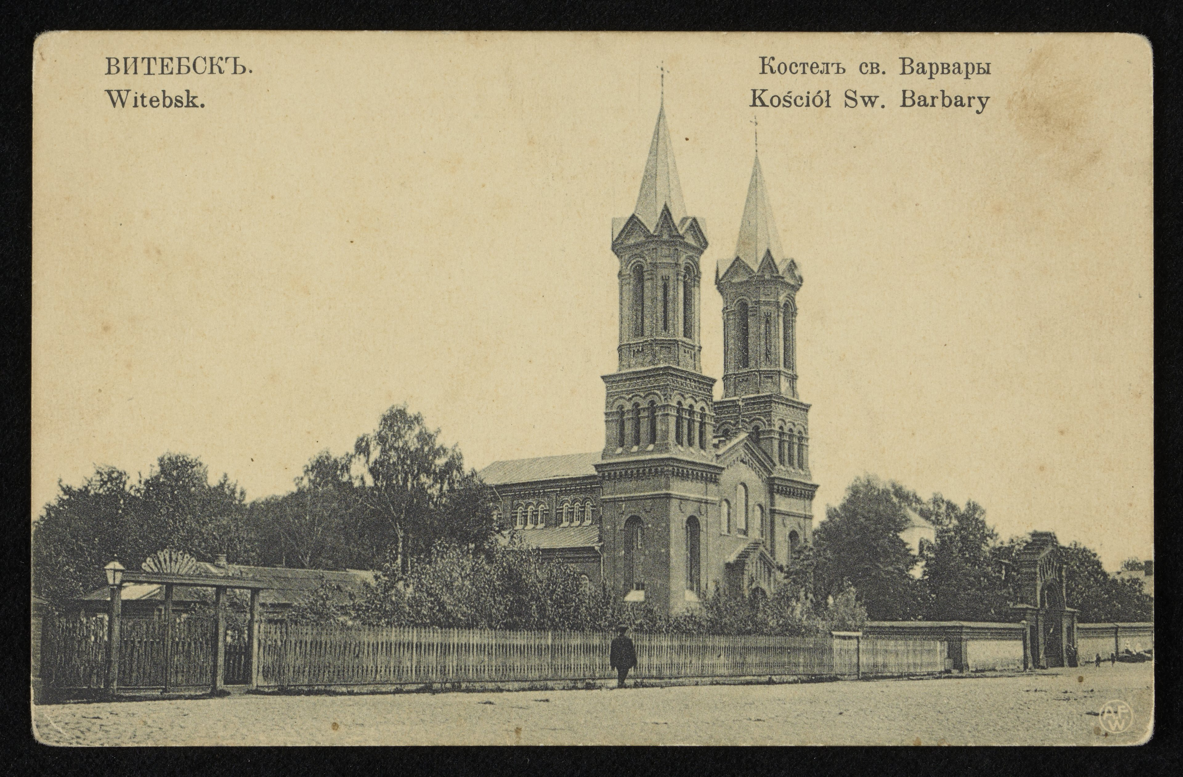 Беларуская (тарашкевіца): Віцебск (Viciebsk), шаша Гарадоцкая (šaša Haradockaja). Касьцёл Сьвятой Барбары